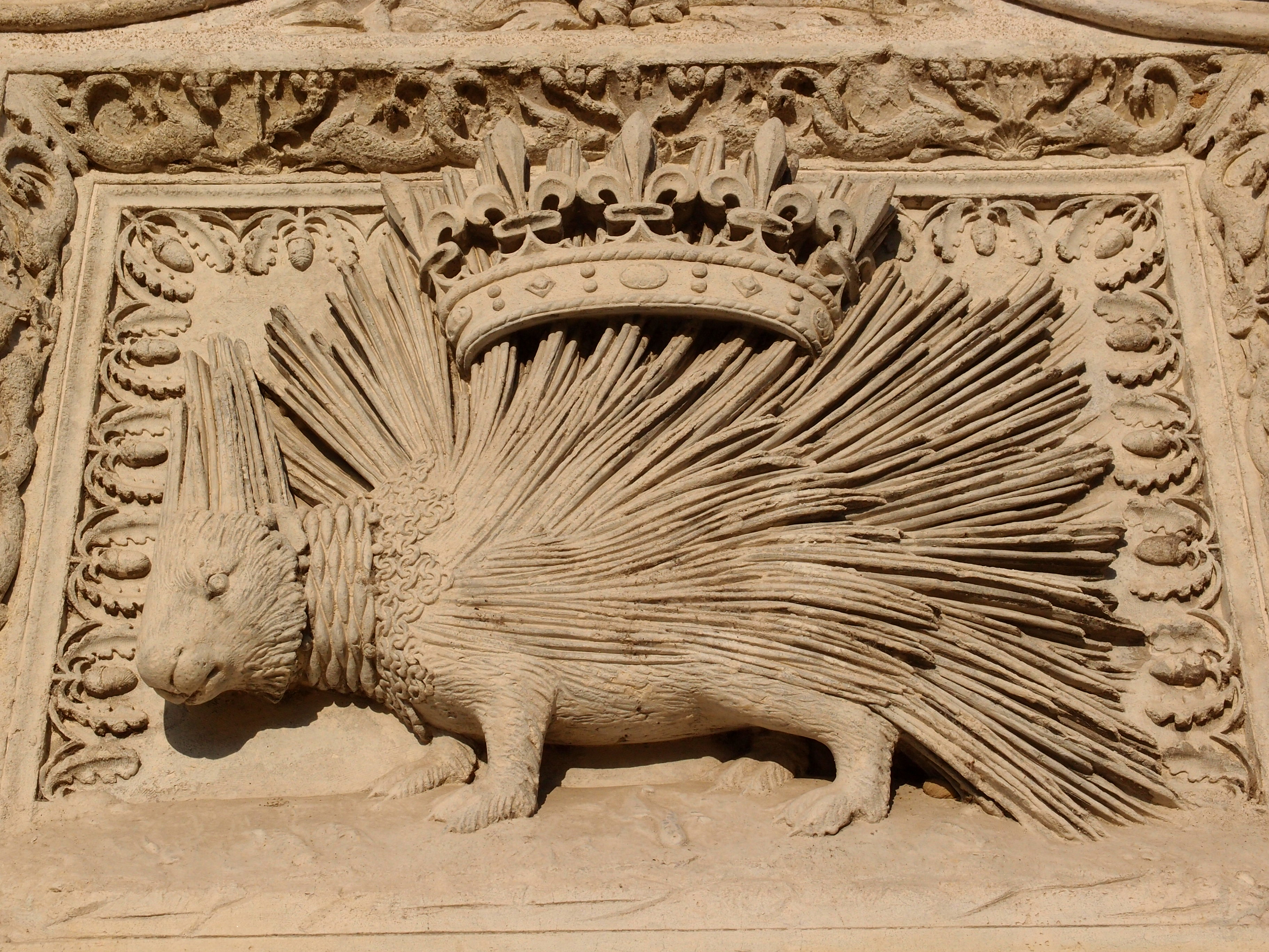 Stachelschwein - Wappentier König Ludwigs XII. am Schloss Blois (Frankreich) Datum: 17.05.2014 Urheber: unbekannter Steinmetz; Foto: M. Pfeiffer alias Gordito1869 Quelle: Privates Fotoarchiv des Fotoerstellers